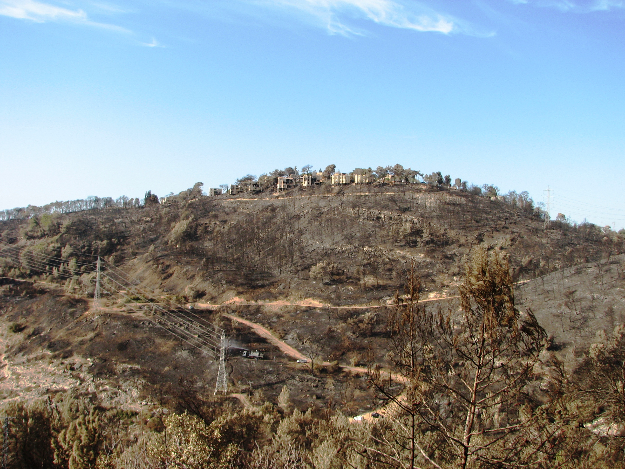 Beit Oren is a kibbutz in northern Israel, located on Mount Caramel. Israel. pictures after 2010 fire בית אורן הוא קיבוץ במרכז רכס הכרמל, בתחום המועצה האזורית חוף הכרמל. תמונות לאתר השריפה של דצמבר 2010 מבט מכוון דרום